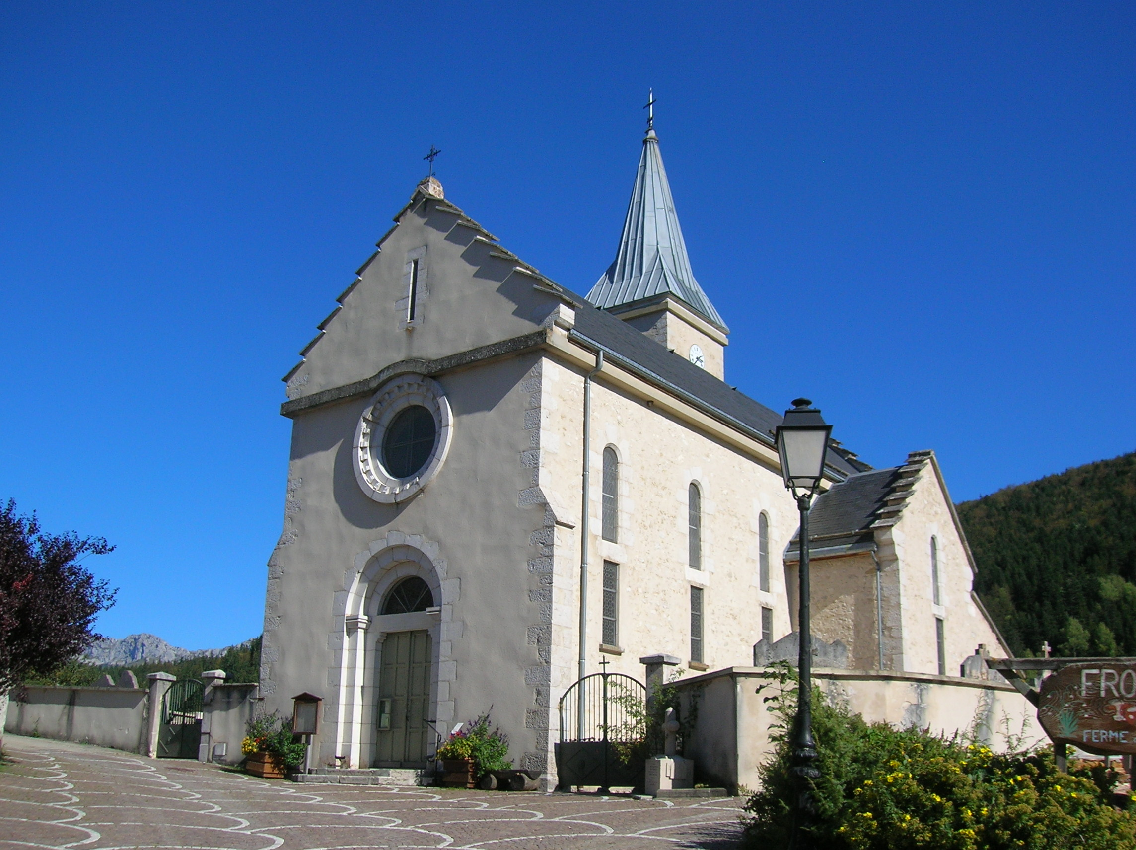 église de Corrençon-en-Vercors, Isère, AuRa, France.